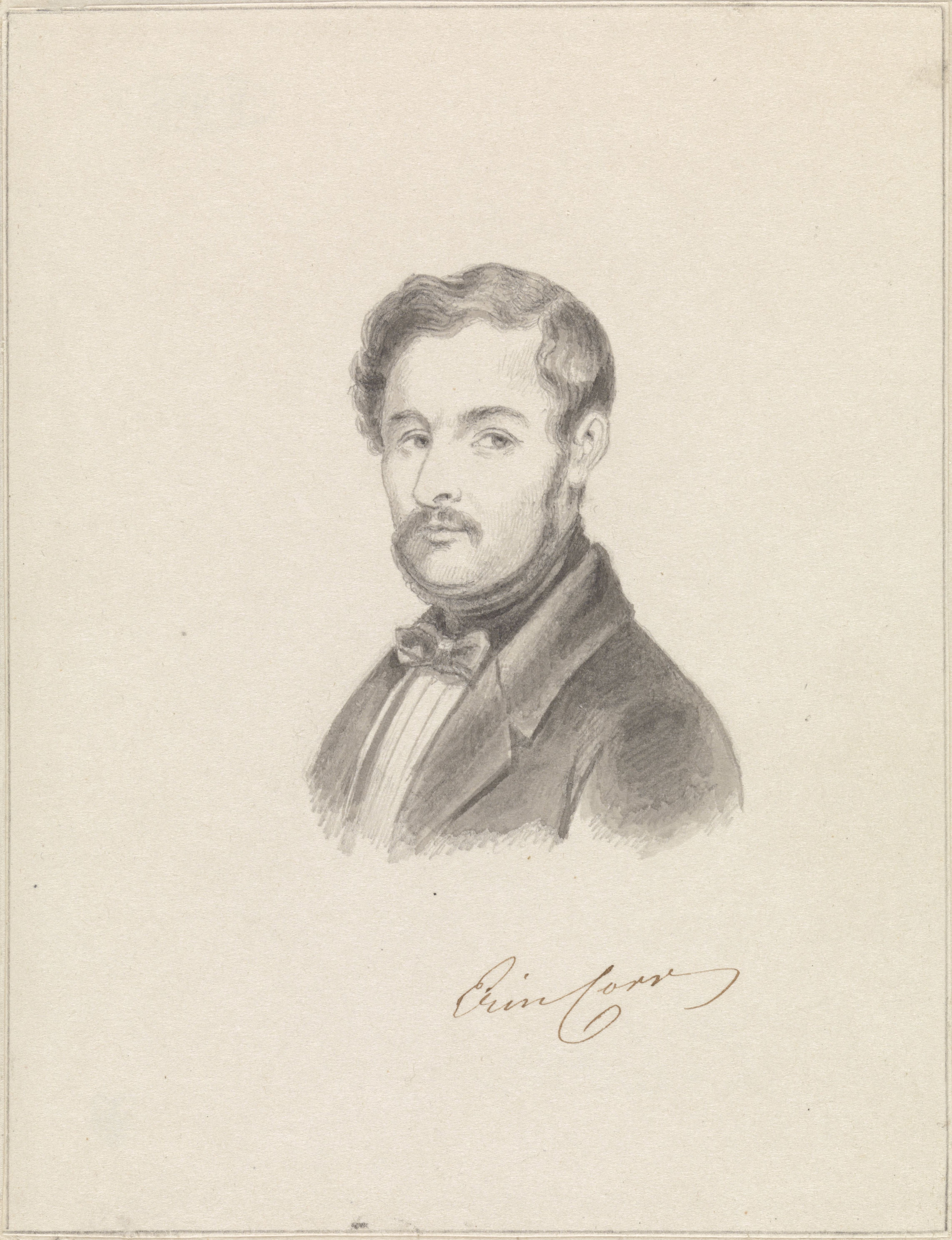 IdentificatieTitel(s): Zelfportret van Erin CorrObjecttype: tekening ontwerp Objectnummer: RP-T-1940-59Omschrijving: Ontwerp voor een prent.VervaardigingVervaardiger: tekenaar: Erin CorrDatering: 1841 - 1842Fysieke kenmerken: penseel in grijs, potloodMateriaal: papier potlood Techniek: penseelAfmetingen: h 142 mm × b 109 mmOnderwerpWat: historical person (EWIN CORR) - historical person (EWIN CORR) portrayed aloneportrait, self-portrait of draughtsmanportrait, self-portrait of painterportrait, self-portrait of artistWie: Erin CorrVerwerving en rechtenCredit line: Aankoop uit het F.G. Waller-FondsVerwerving: aankoop 1940Copyright: Publiek domein